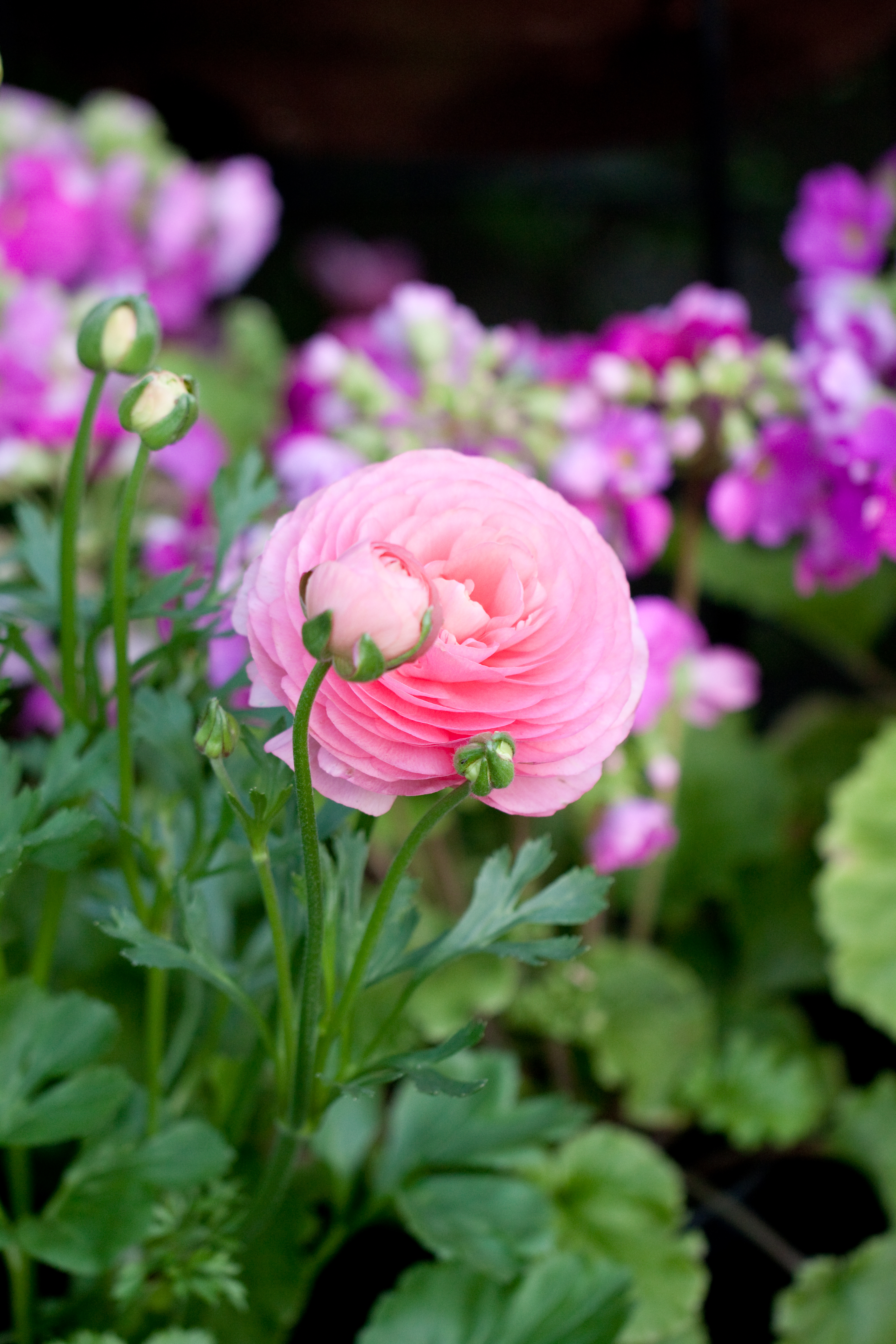 Persian buttercup. (Ranunculus asiaticus) "M-Sakura". ラナンキュラス。品種名は「M-Sakura」。 昔はあまり好きじゃなかったけど、最近はかなり好きになった花。庭があったら育ててみたいなぁ。